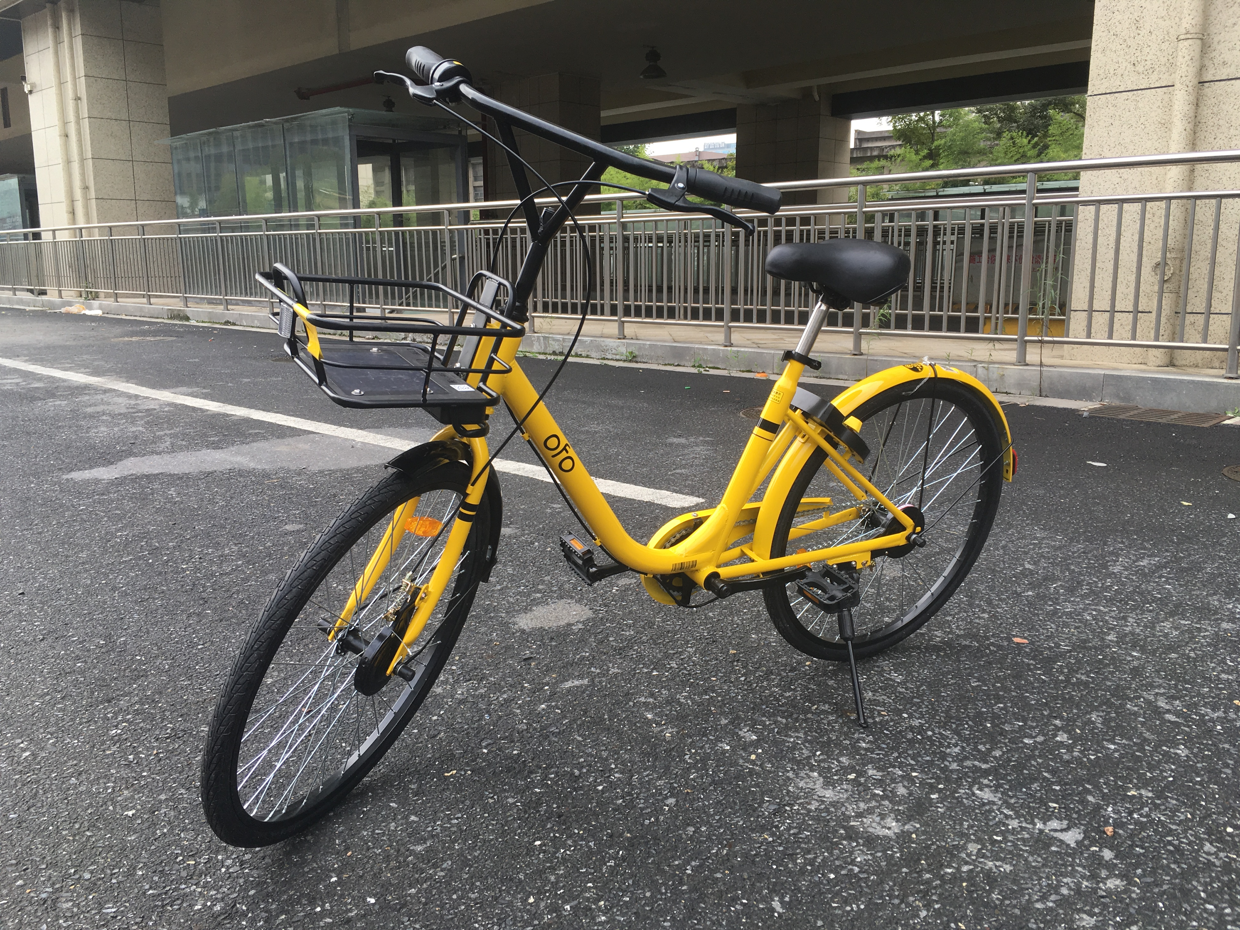 一部2017年10月新款ofo自行车